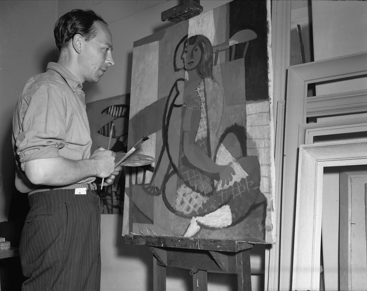 Thore Heramb født 29. desember 1916 i Oslo, norsk maler.